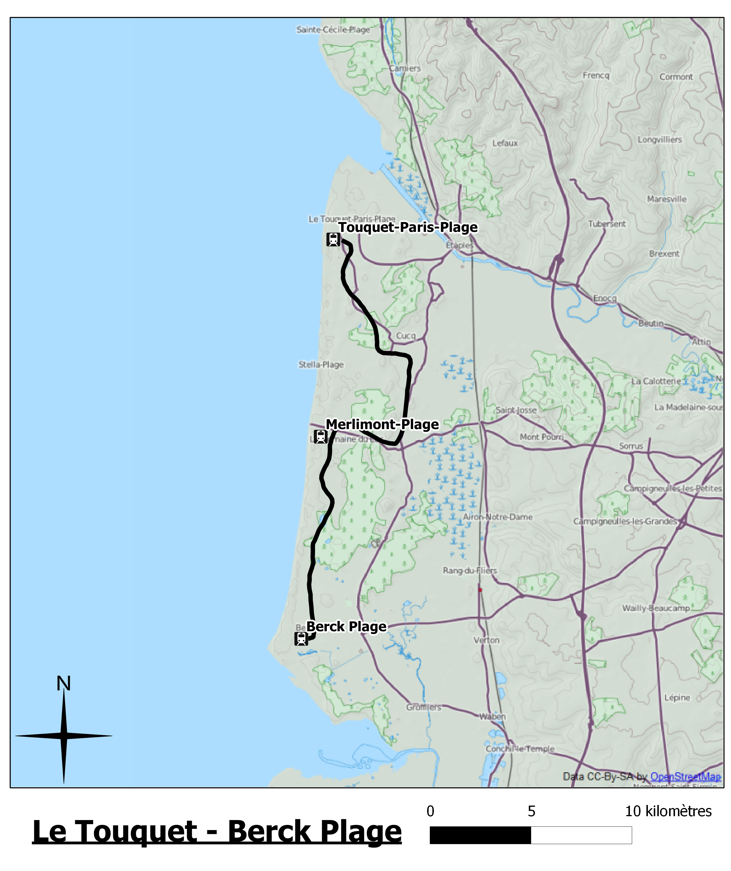 La ligne Le Touquet - Berck Plage. Fonds de carte : Open Street Map.